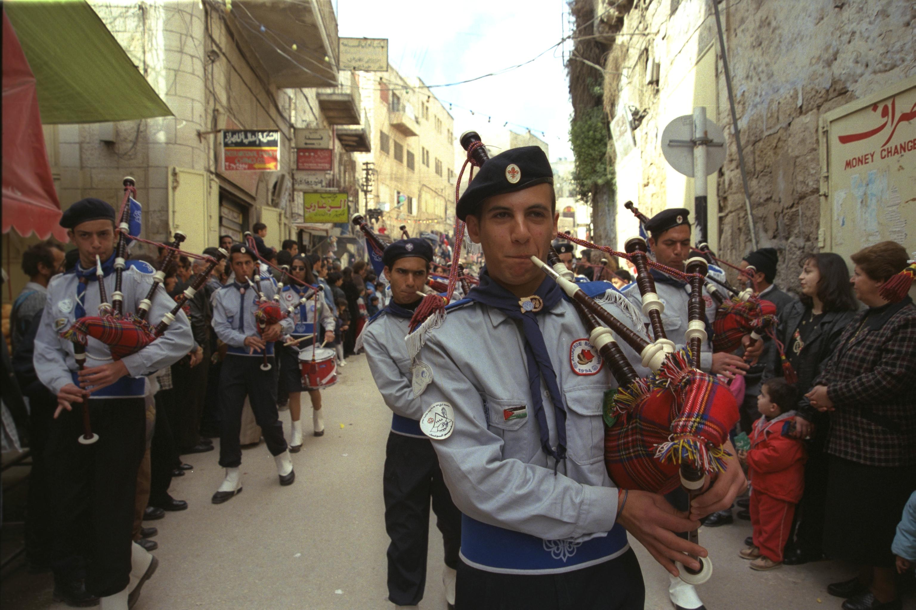 A bag pipe orchestra from Bethlehem playing in the streets of the city, during the Greek orthodox Christmas procession (06/01/1999) תזמורת חמת חלילים מבית לחם מנגנת ברחובות העיר במהלך חגיגות חג המולד של הקהילה היוונית אורתודוכסית